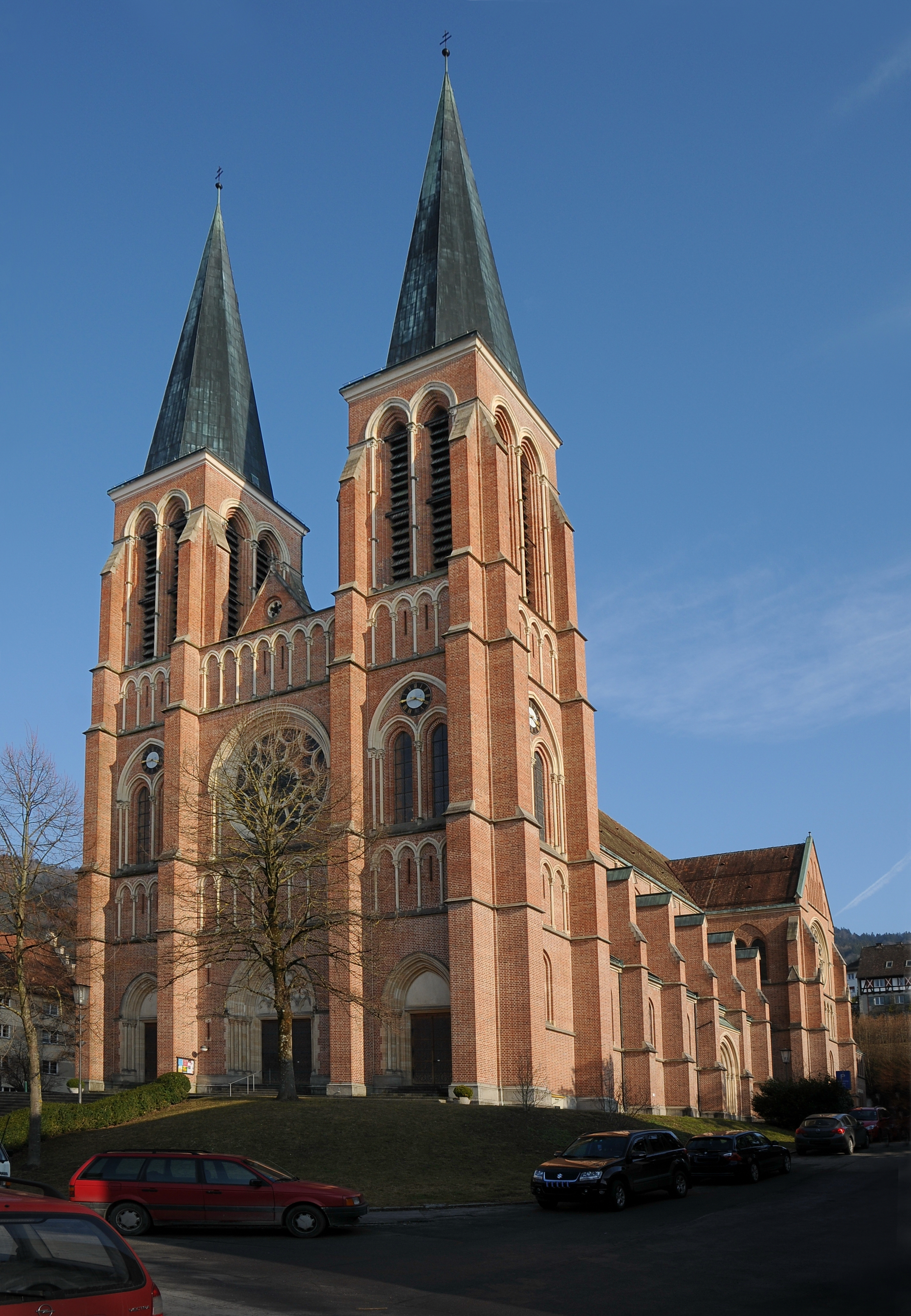 Herz-Jesu-Kirche in Bregenz. Architekt: Joseph Cades Baujahre 1905/08, Baumeister: Kornel Rhomberg aus Bregenz sowie Paul Faulhaber aus Rottweil.